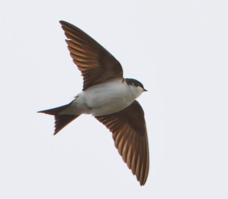 House Martin - Delichon urbicum - Bæjasvala. Reykjavik, Iceland